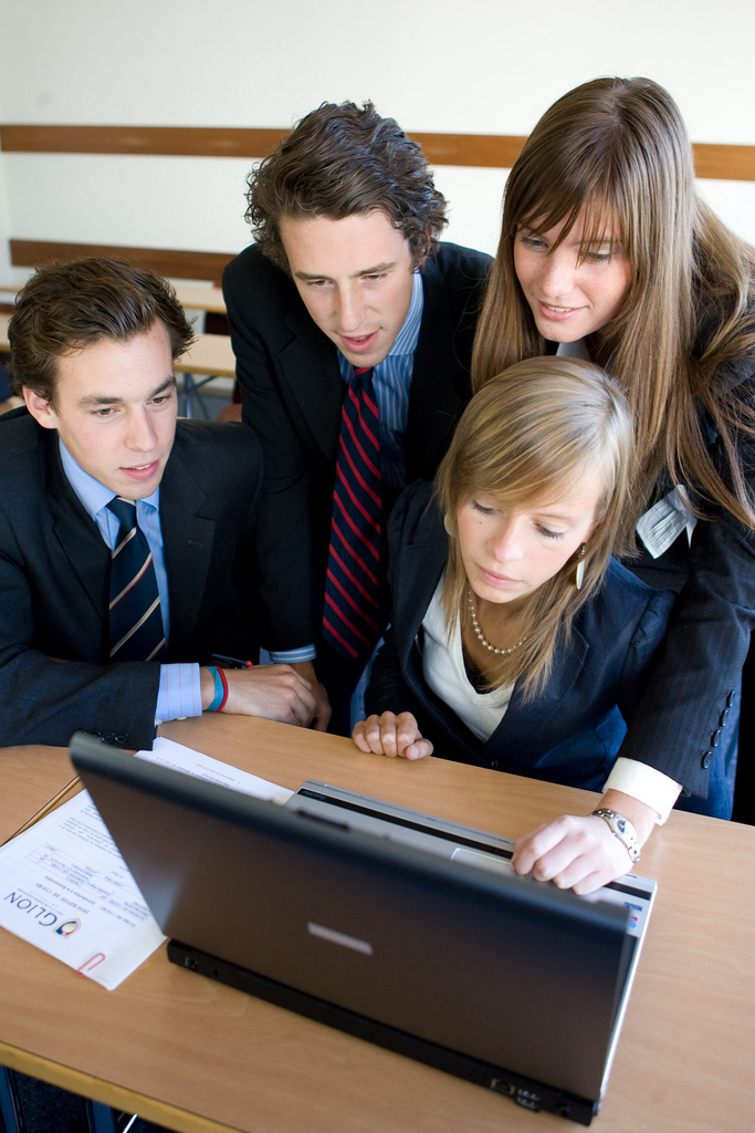 Glion creates a strong social environment on and off campus, which encourages lif-long friendships. You will have a broad range of social activities to choose from. each campus has a dedicated social coordinator who assists students with all sorts of day-to-day needs and organizes many events and activities. Grâce l'excellent environnement social aussi bien sur le campus qu'en dehors, des amitiés fortes et durables se créent entre les étudiants. Un grand choix d'activités sociales et culturelles sont disponibles et chaque campus dispose d'un coordinateur social attitré qui assiste les étudiants dans toutes sortes de besoins quotidiens et qui organise de nombreuses activités et divertissements.